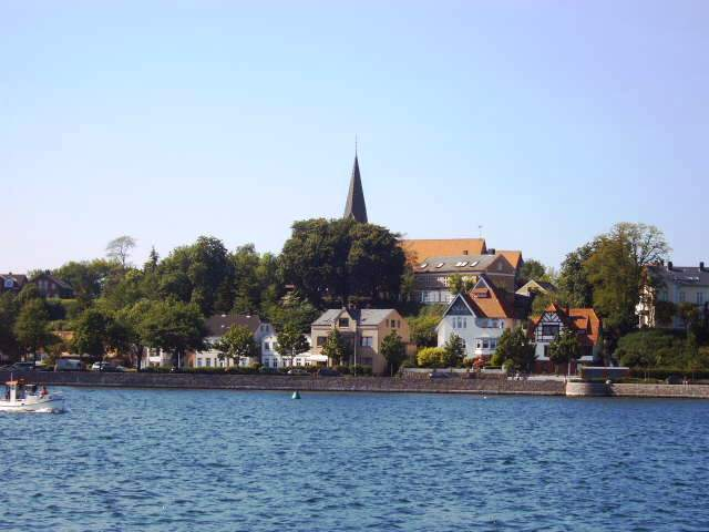 Eckernförde. Blick auf die Borbyer Kirche.